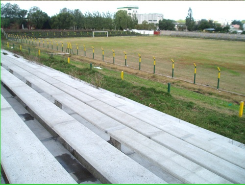 Parque Maracaná, cancha del Club Spoortivo Cerrito